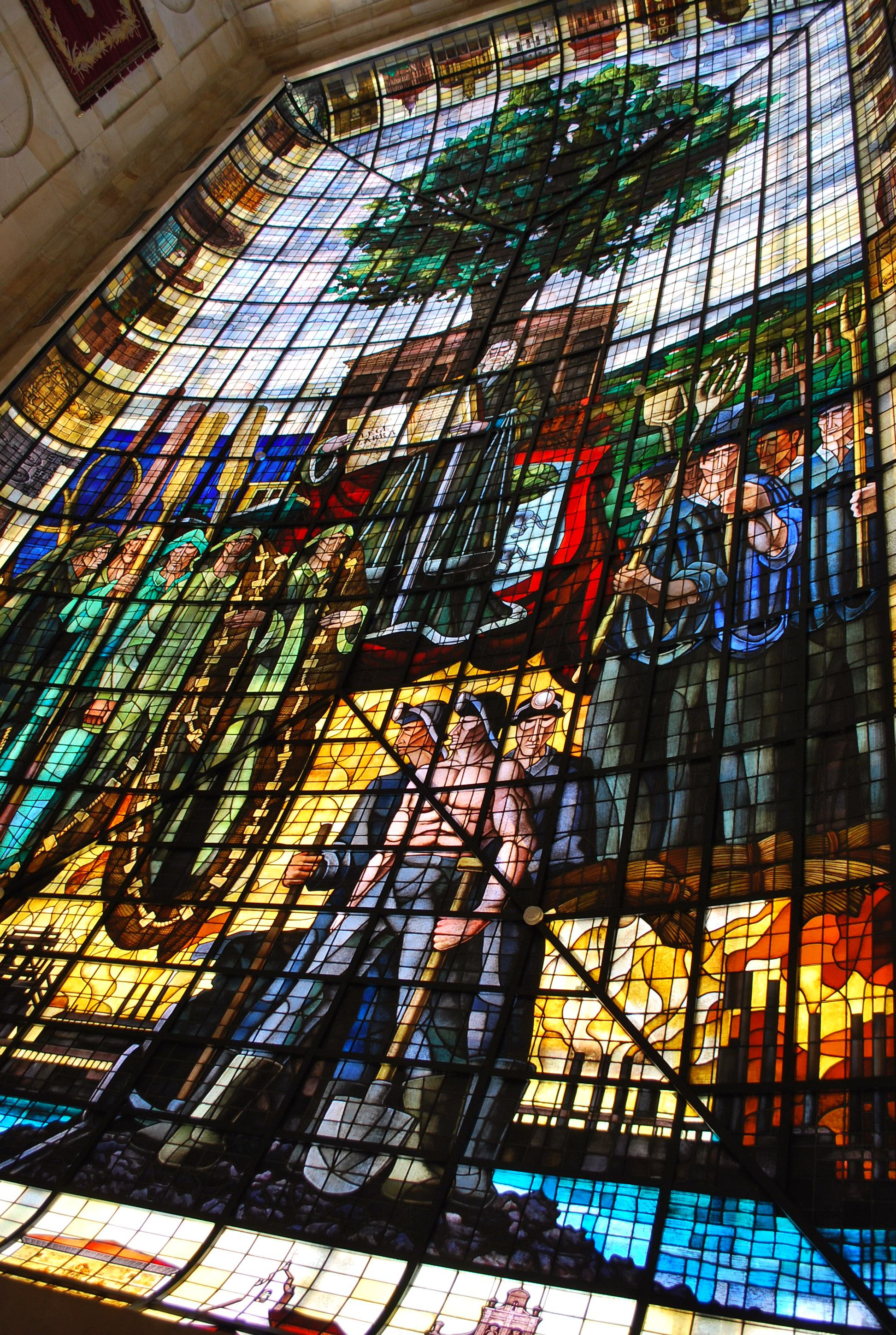 Toiture en vitrail remarquable faisant référence aux premières assemblées (fors) à Gernika (Biscaye).